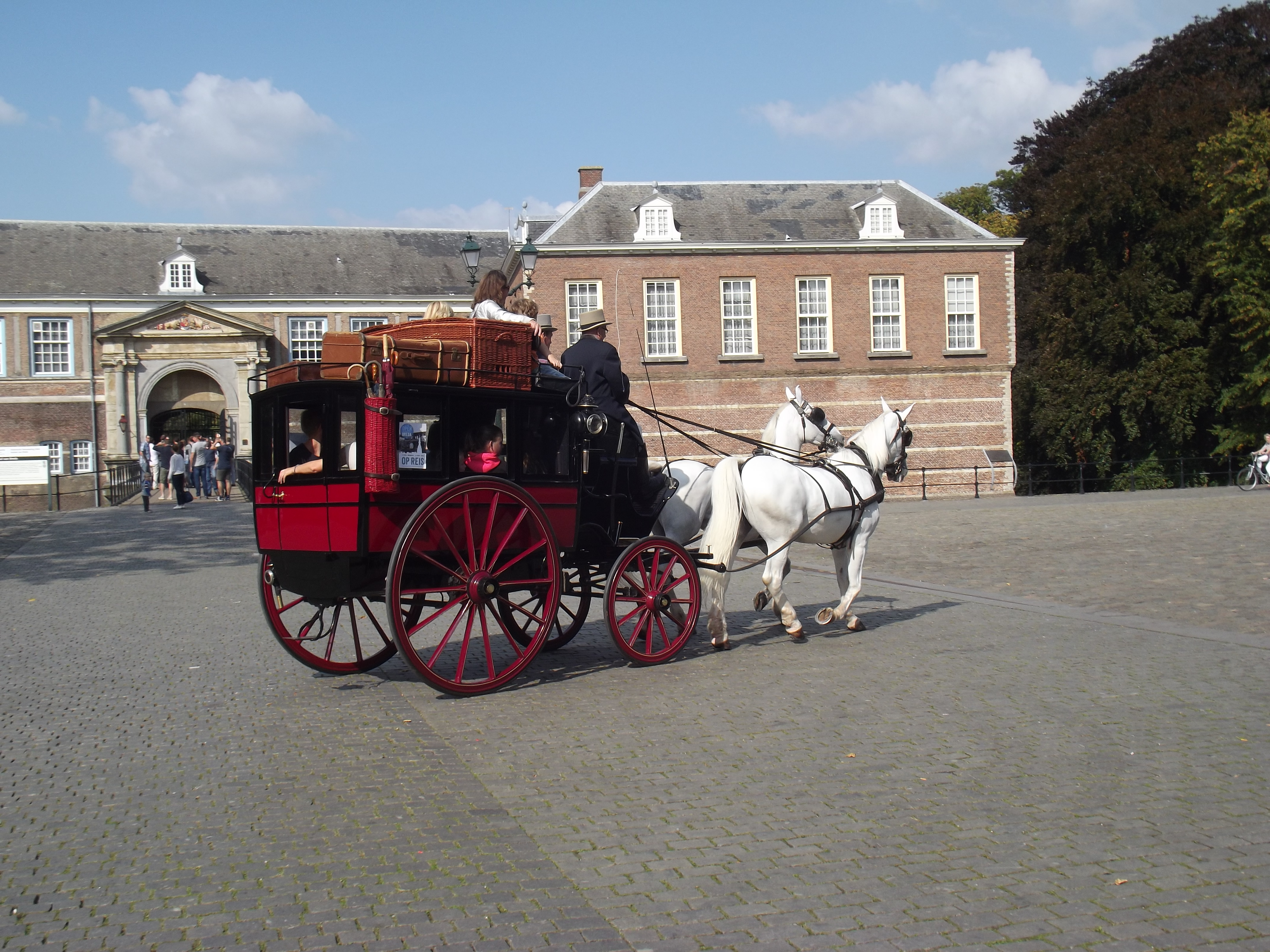 Een historische diligence paardenkoets in Breda ter gelegenheid van de Open monumentendag. Hier tegenover de kazerne.